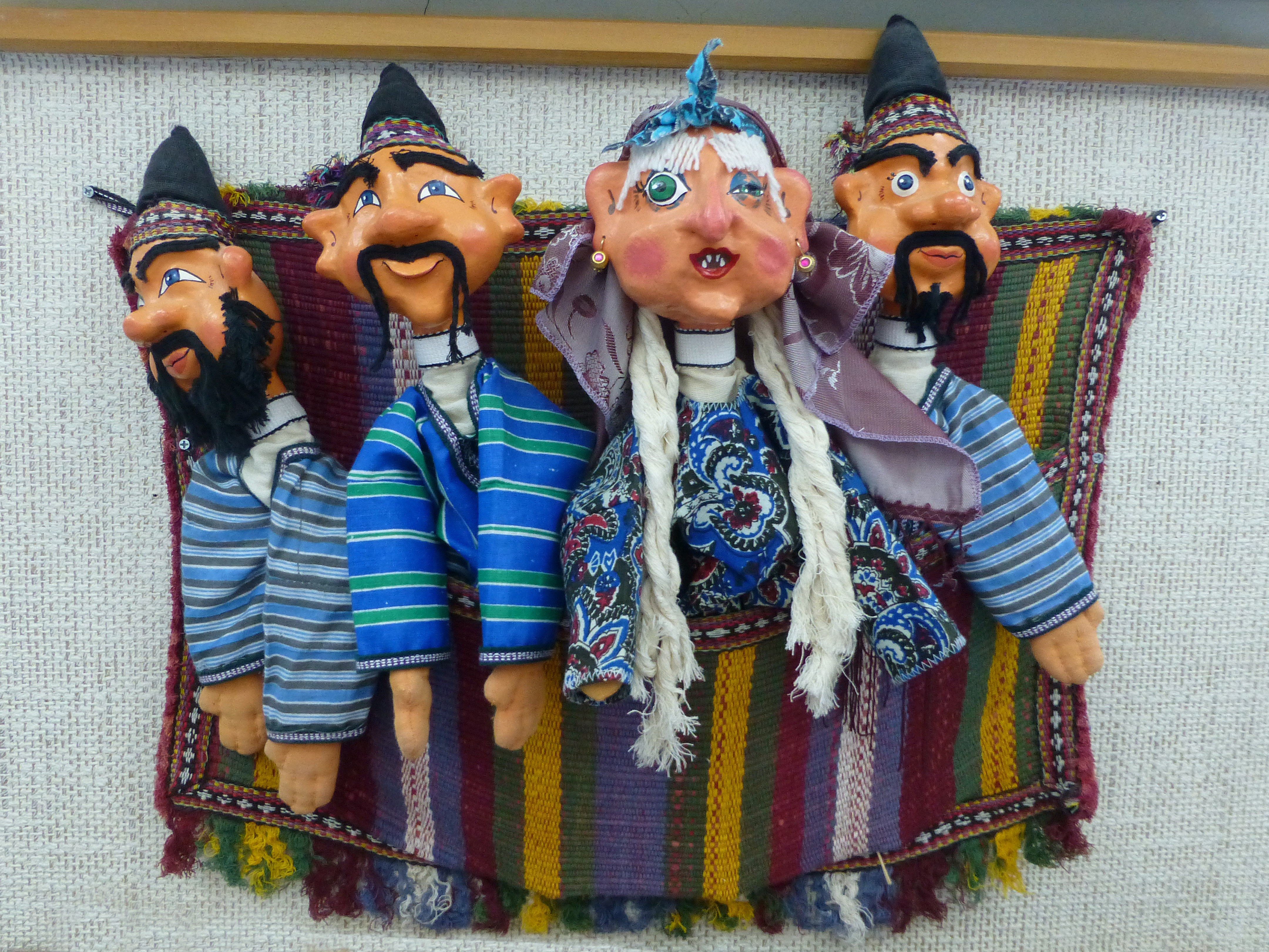 Marionnettes de Boukhara (Ouzbékistan)